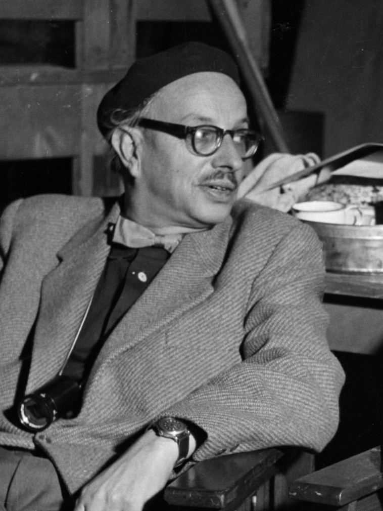 Filmregisseur Gerard Rutten in de filmstudio. Gerard Rutten op de set in gesprek met een actrice 10 december 1953